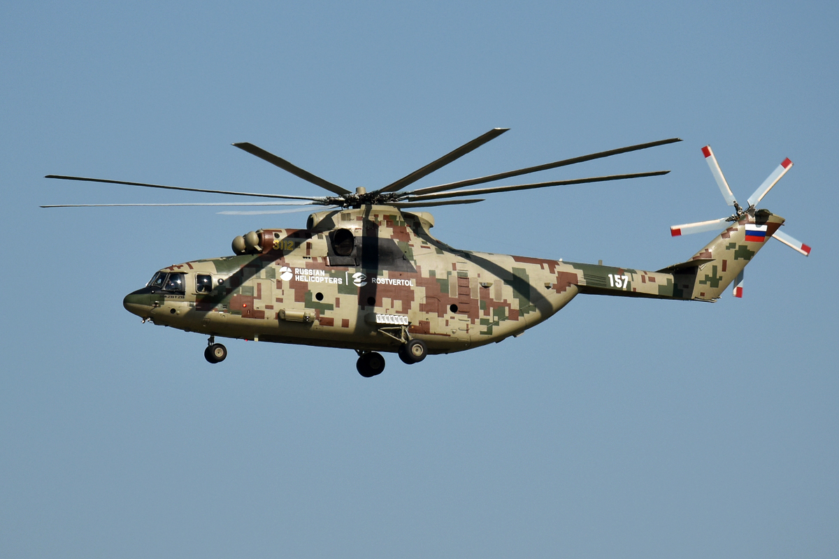 Mil Design Bureau, 3112, Mil Mi-26T2 Halo